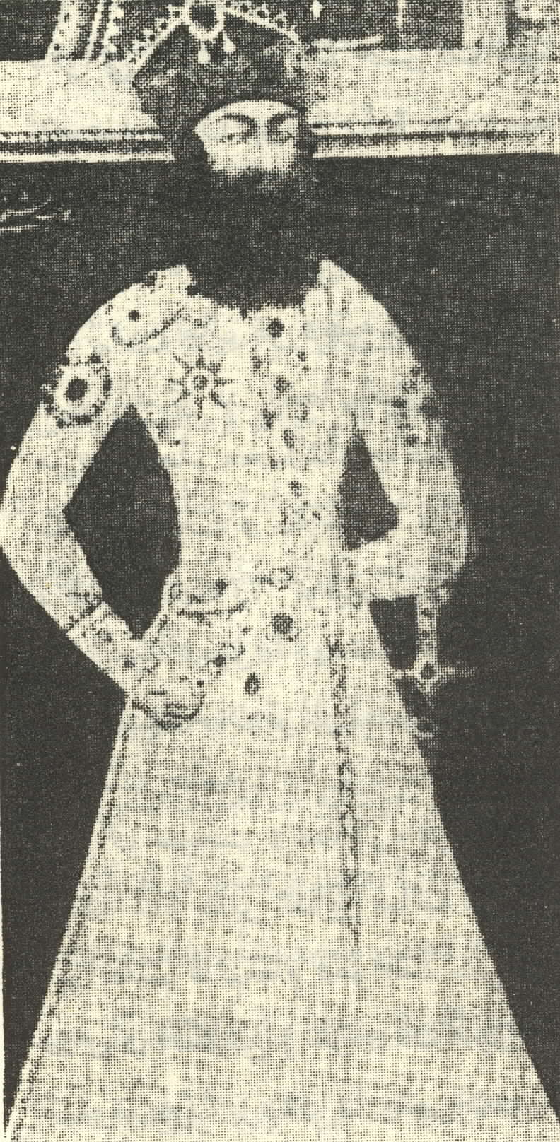 علی میرزاظل السلطان ملقب به عادل شاه